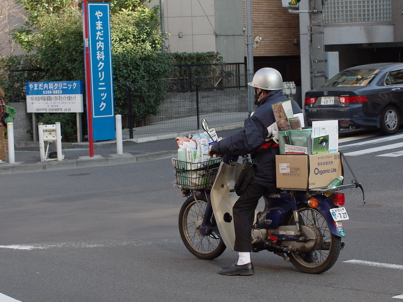 Honda SuperCub